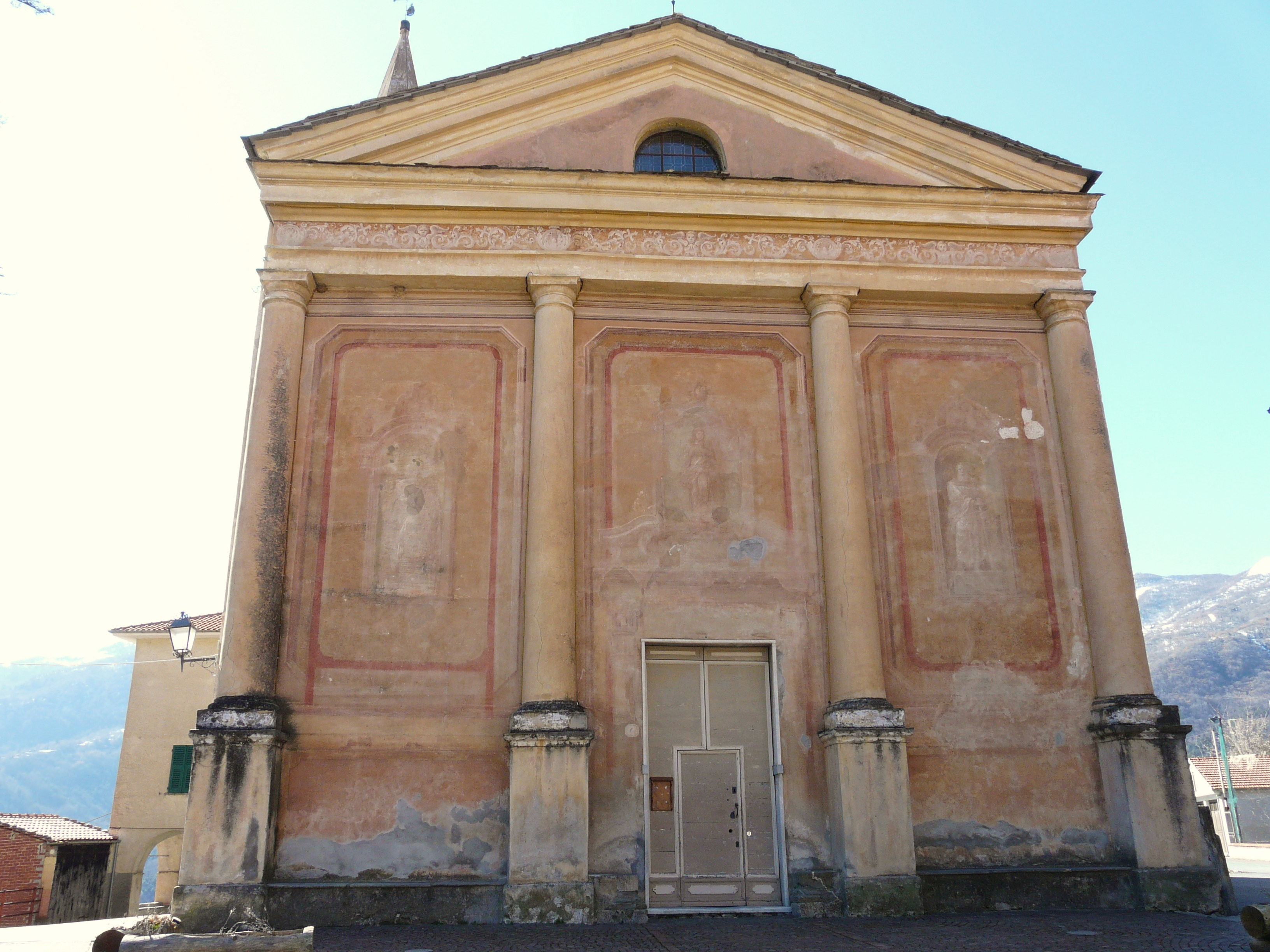 Chiesa dei Santi Pietro e Paolo, Cosio di Arroscia, Liguria, Italia